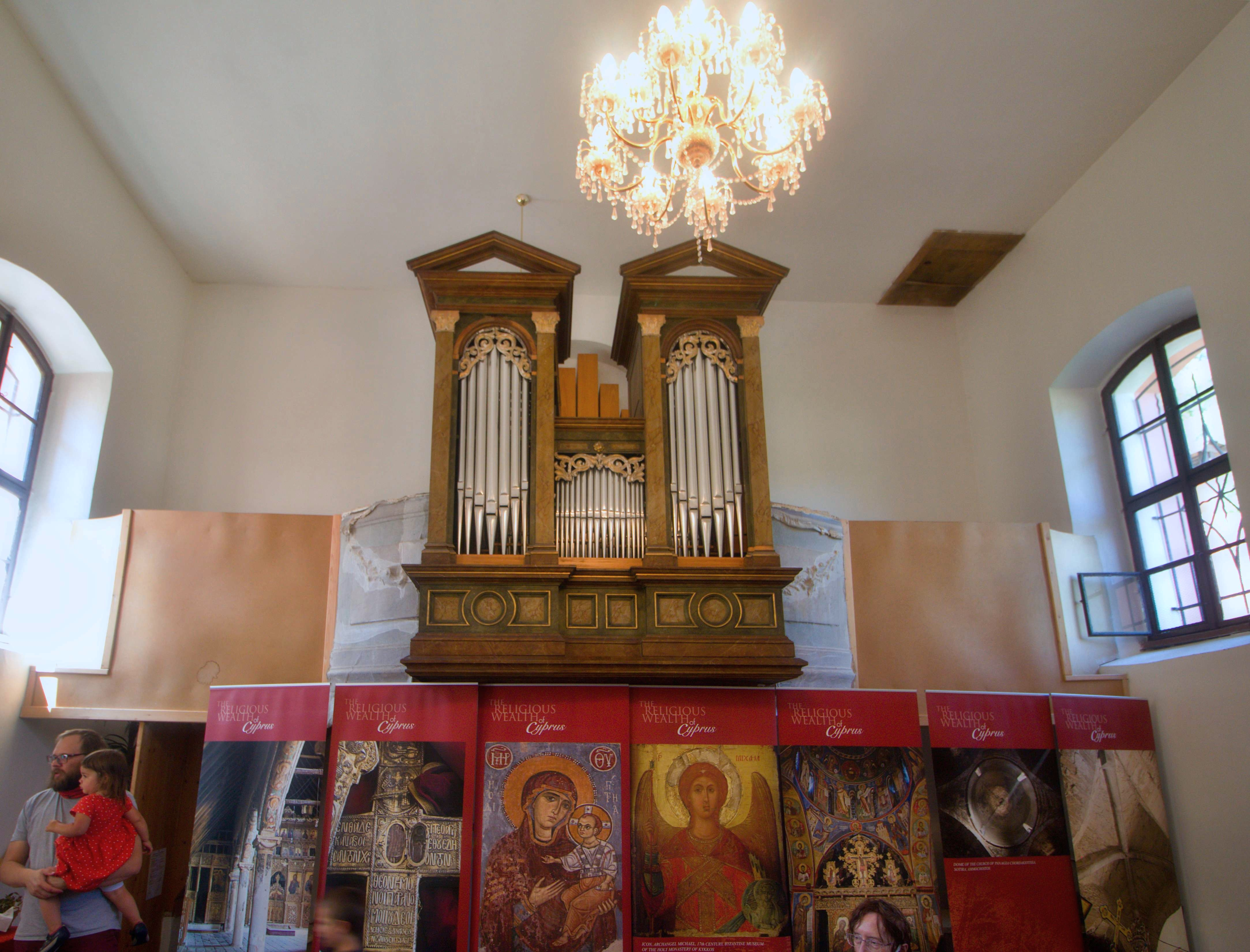 Praha-Malá Chuchle, chrám Narození Panny Marie